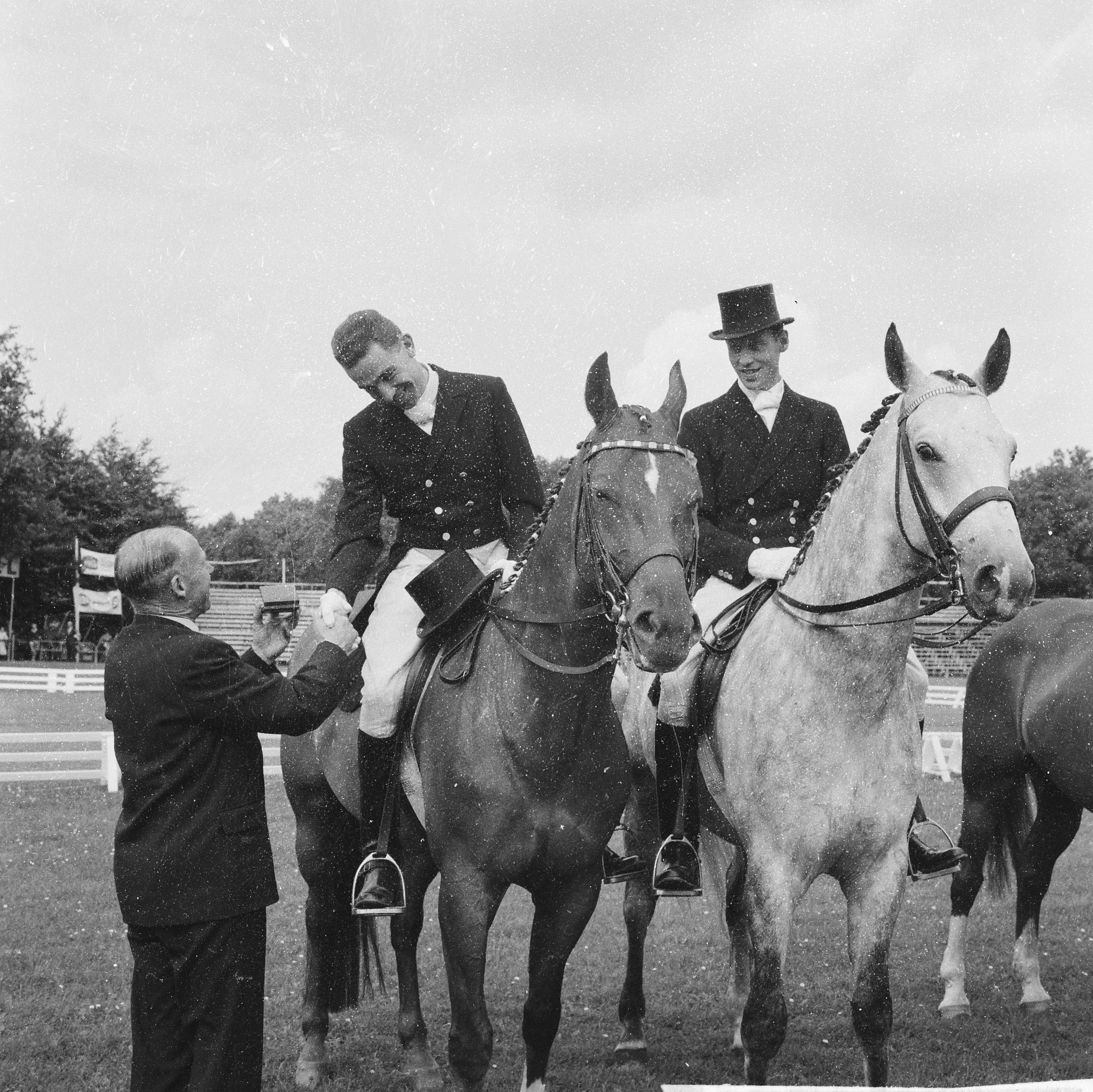 Collectie / Archief : Fotocollectie Anefo Reportage / Serie : [ onbekend ] Beschrijving : Dressuur Concours te Rotterdam, links R. Klimke en rech H. Boldt , beide Duitsers Datum : 24 augustus 1962 Locatie : Rotterdam, Zuid-Holland Trefwoorden : CONCOURSEN, DRESSUUR Persoonsnaam : H. Boldt, Klimke, R. Fotograaf : Koch, Eric / Anefo Auteursrechthebbende : Nationaal Archief Materiaalsoort : Negatief (zwart/wit) Nummer archiefinventaris : bekijk toegang 2.24.01.03 Bestanddeelnummer : 914-2348